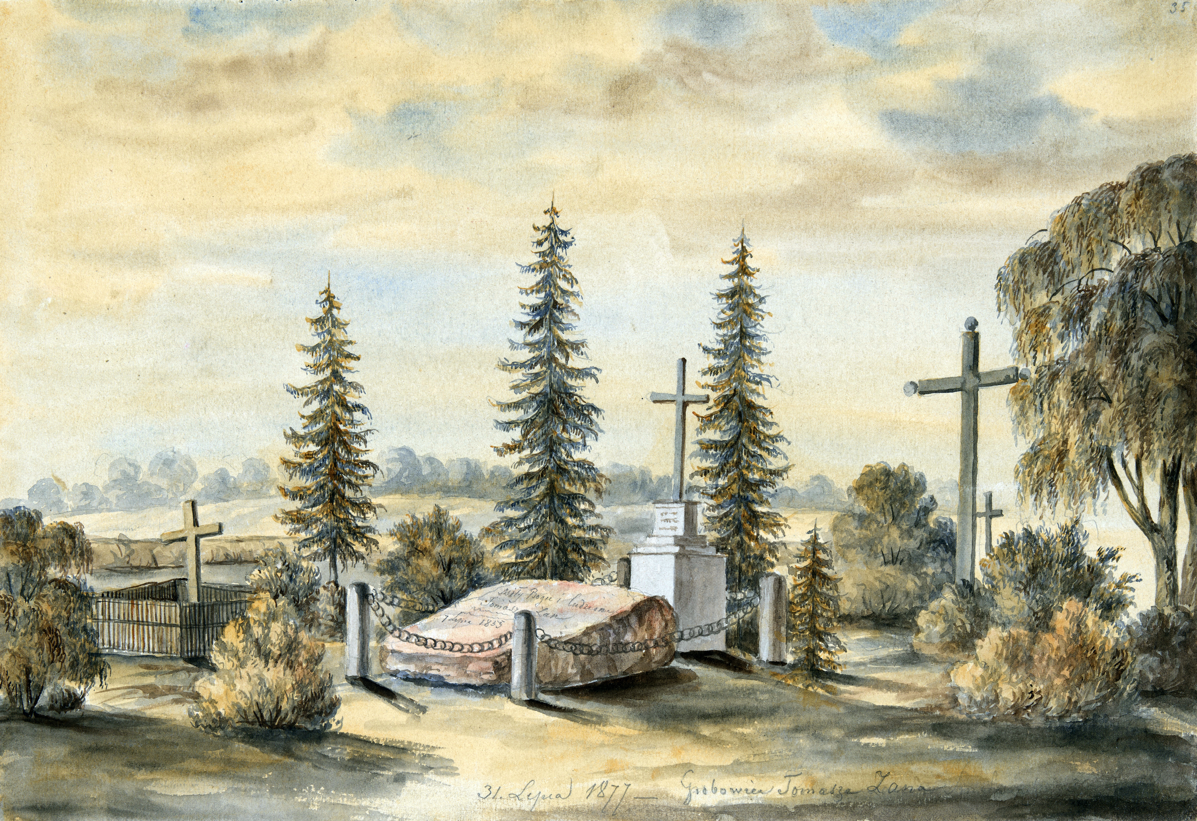 Беларуская (тарашкевіца): Смальяны (Smaljany), надмагільле Тамаша Зана (Tamaš Zan)